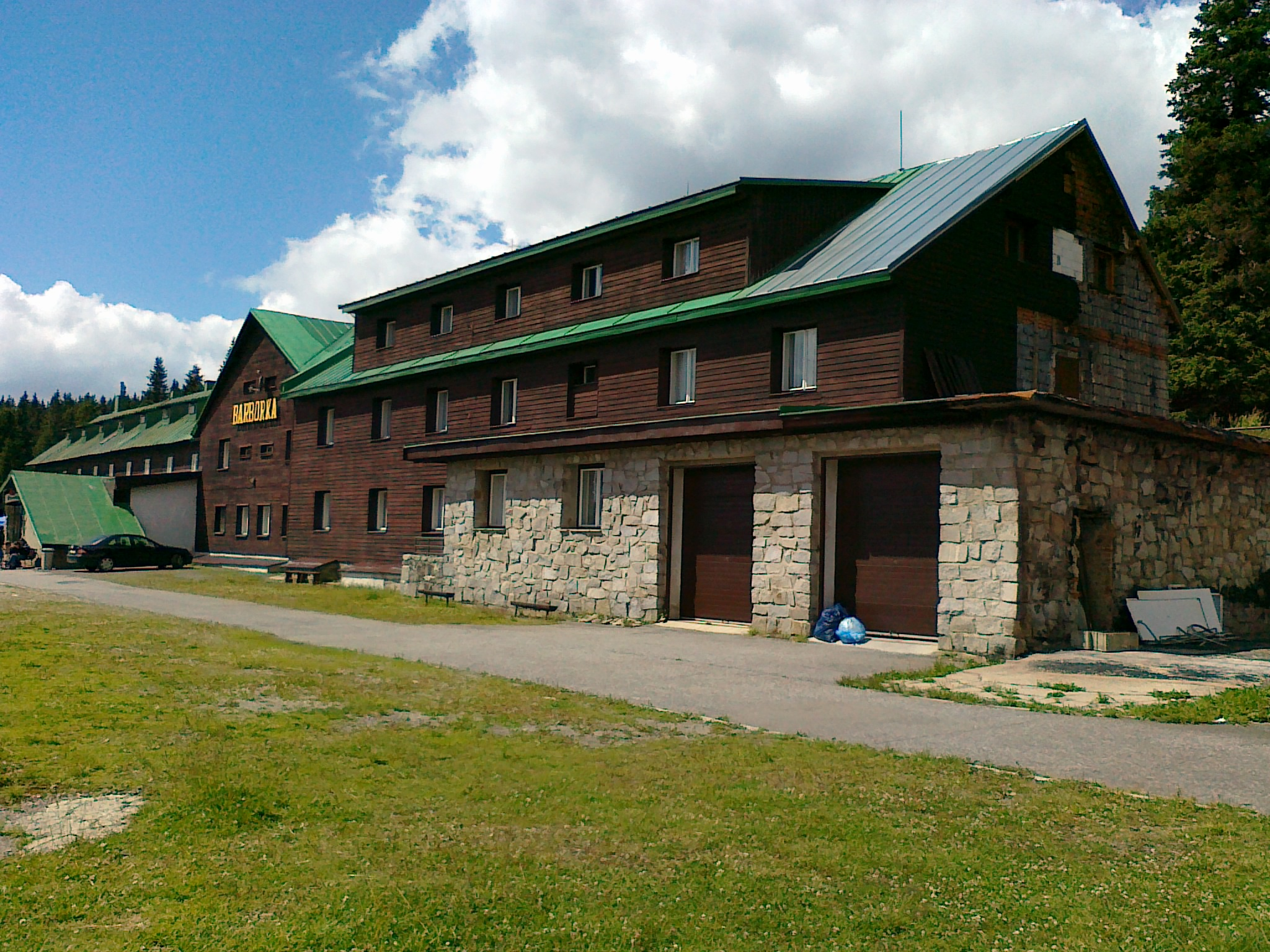 Schronisko górskie Barborka w Wysokim Jesioniku (Czechy)